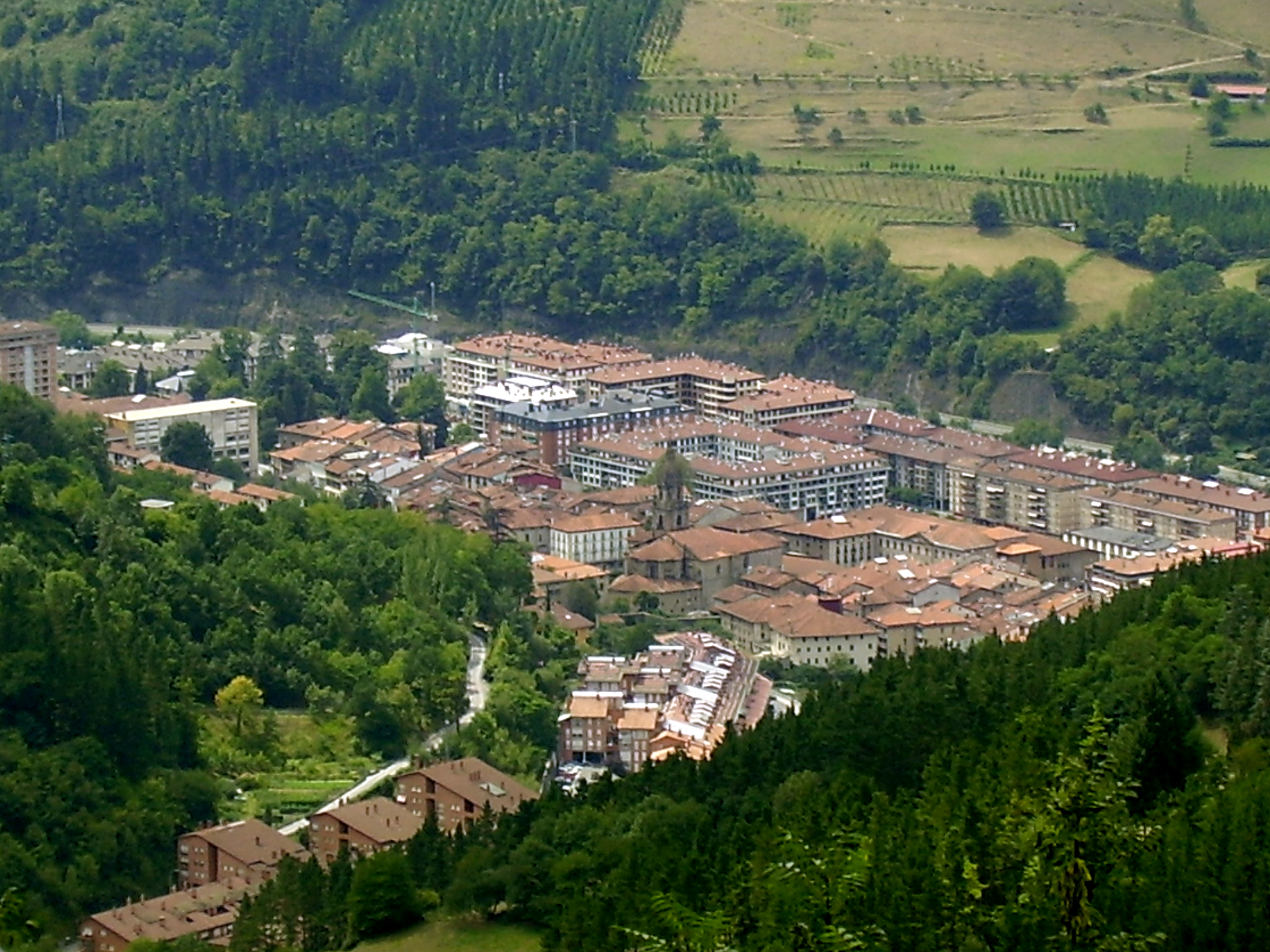 bergara (gipuzkoa)